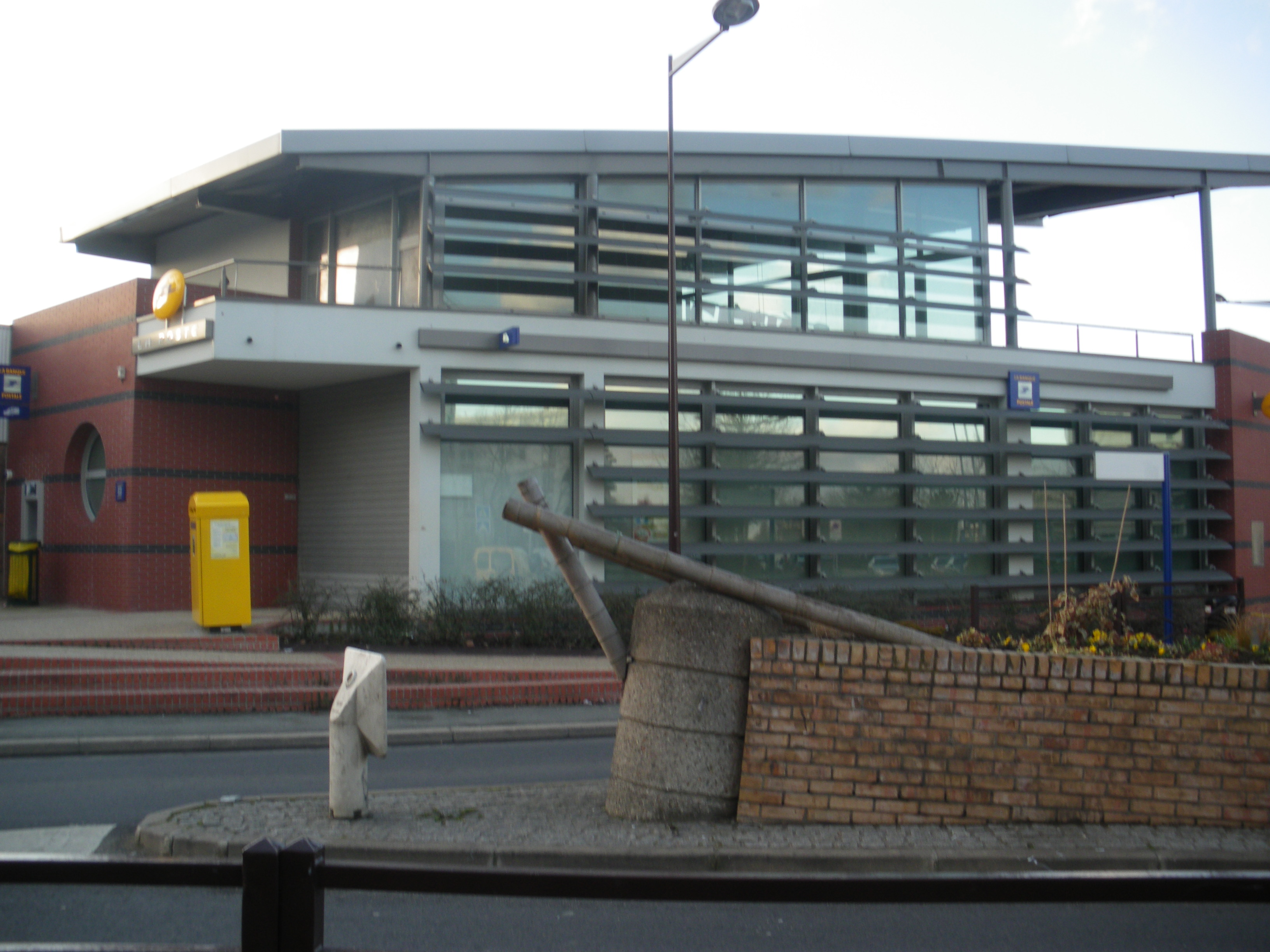 Poste annexe les ulis, Essonne, France